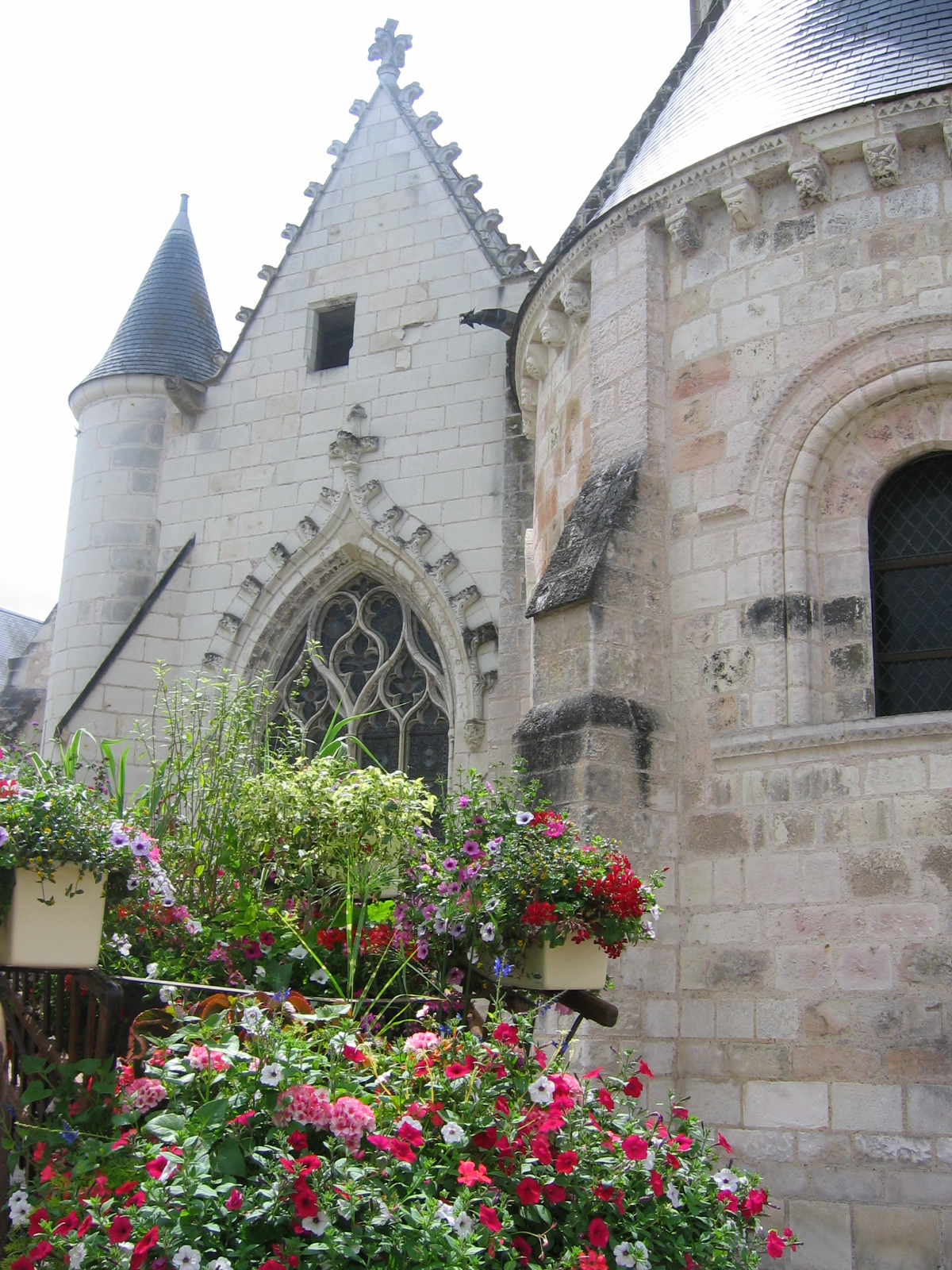 Eglise Saint-Christophe